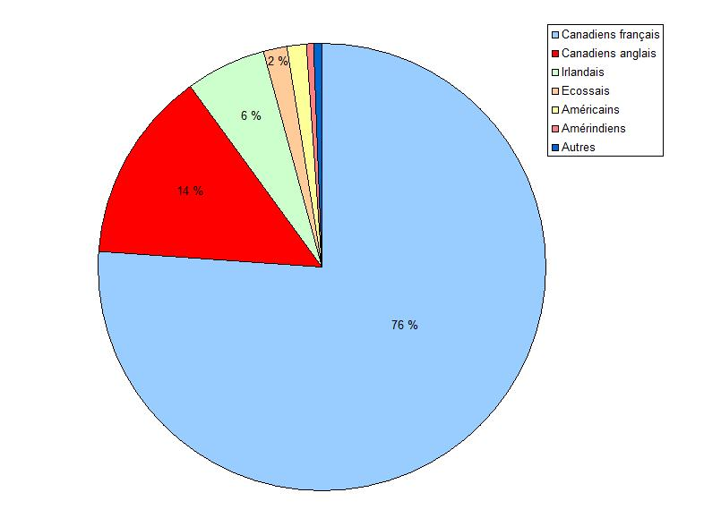 Composition, en fonction de l'origine, de la population québecoise, en 1851.